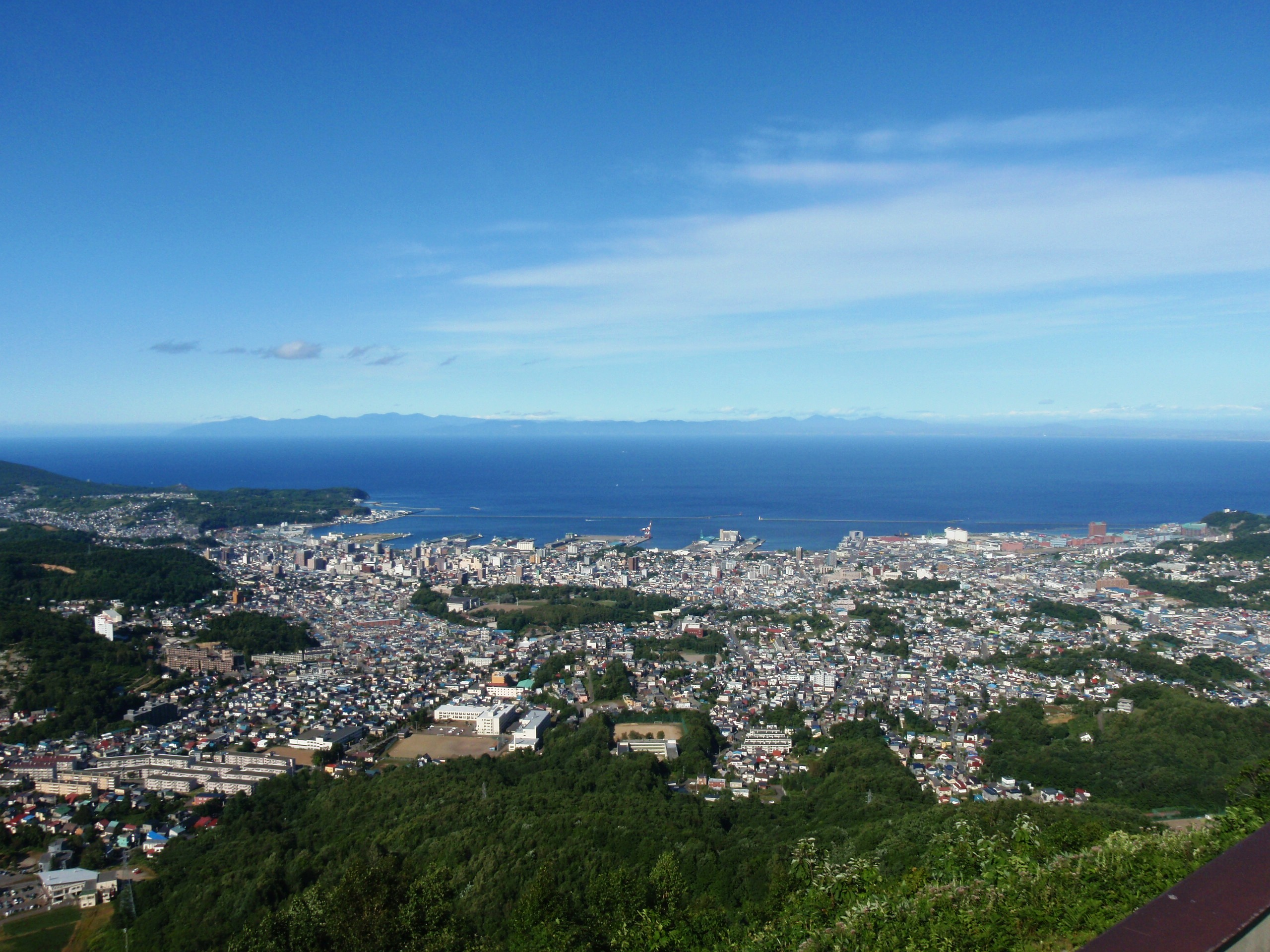 天狗山から見る小樽市街地。石狩湾越しに増毛山地を遠望する。